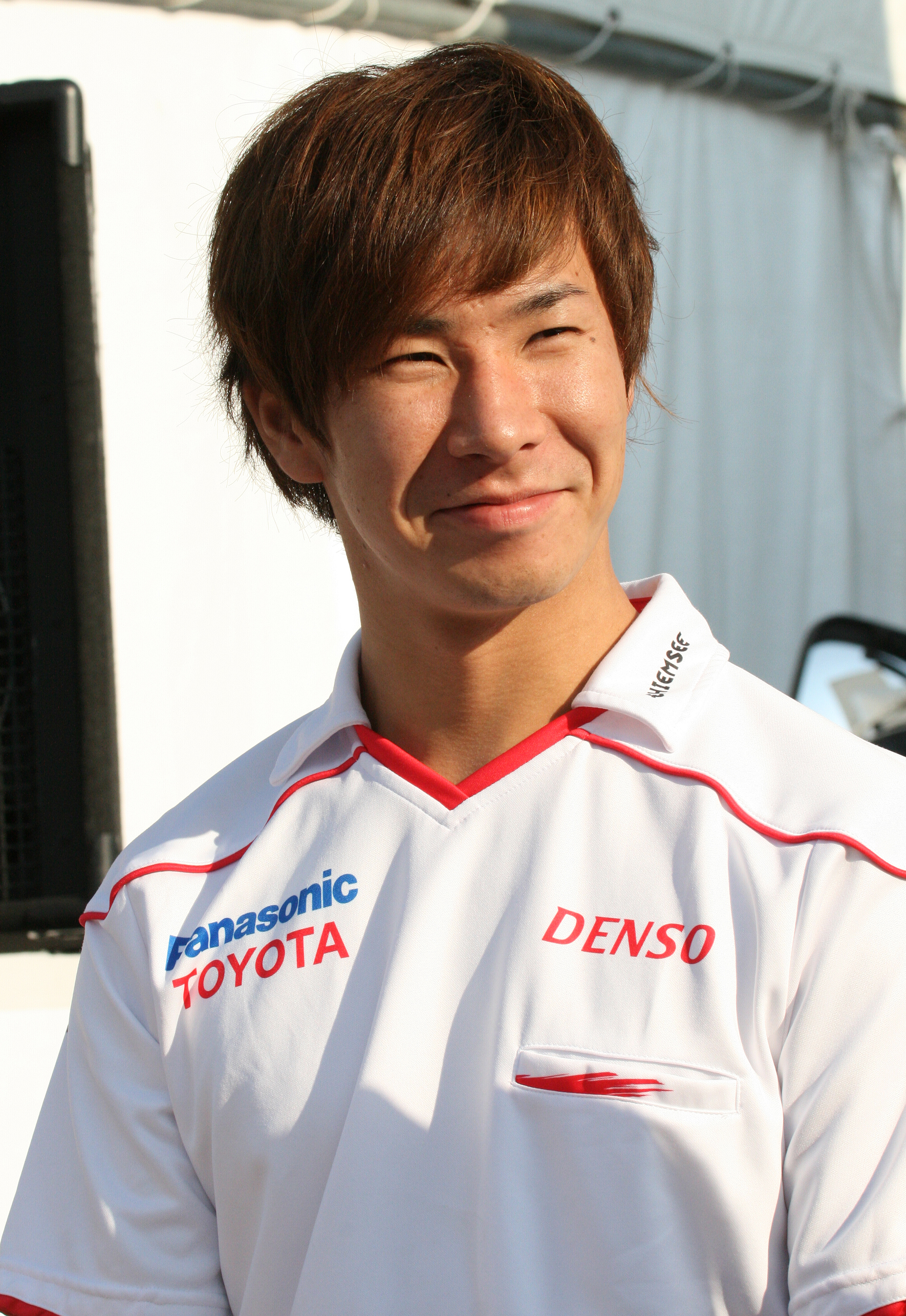 Motorsport Japan 2009: Kamui Kobayashi